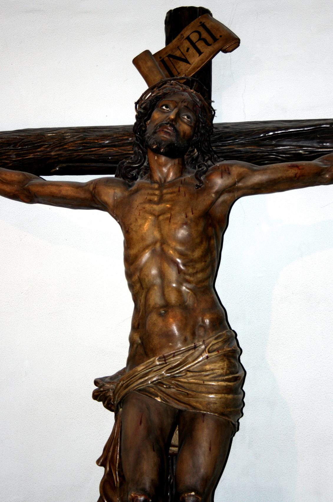 Juan Alonso Villabrille y Ron (atribuido), Cristo del Perdón. Parroquial de la Maravillas y de Santos Justo y Pastor, Madrid.